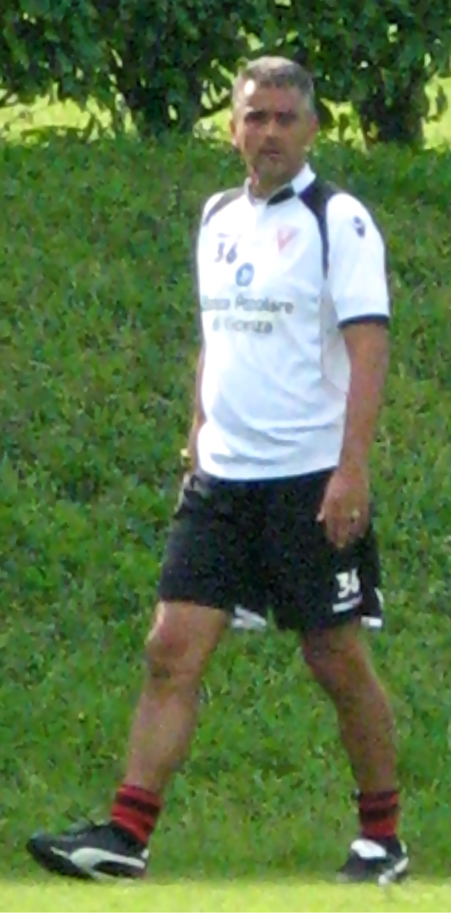 Giovanni Lopez allena il Vicenza